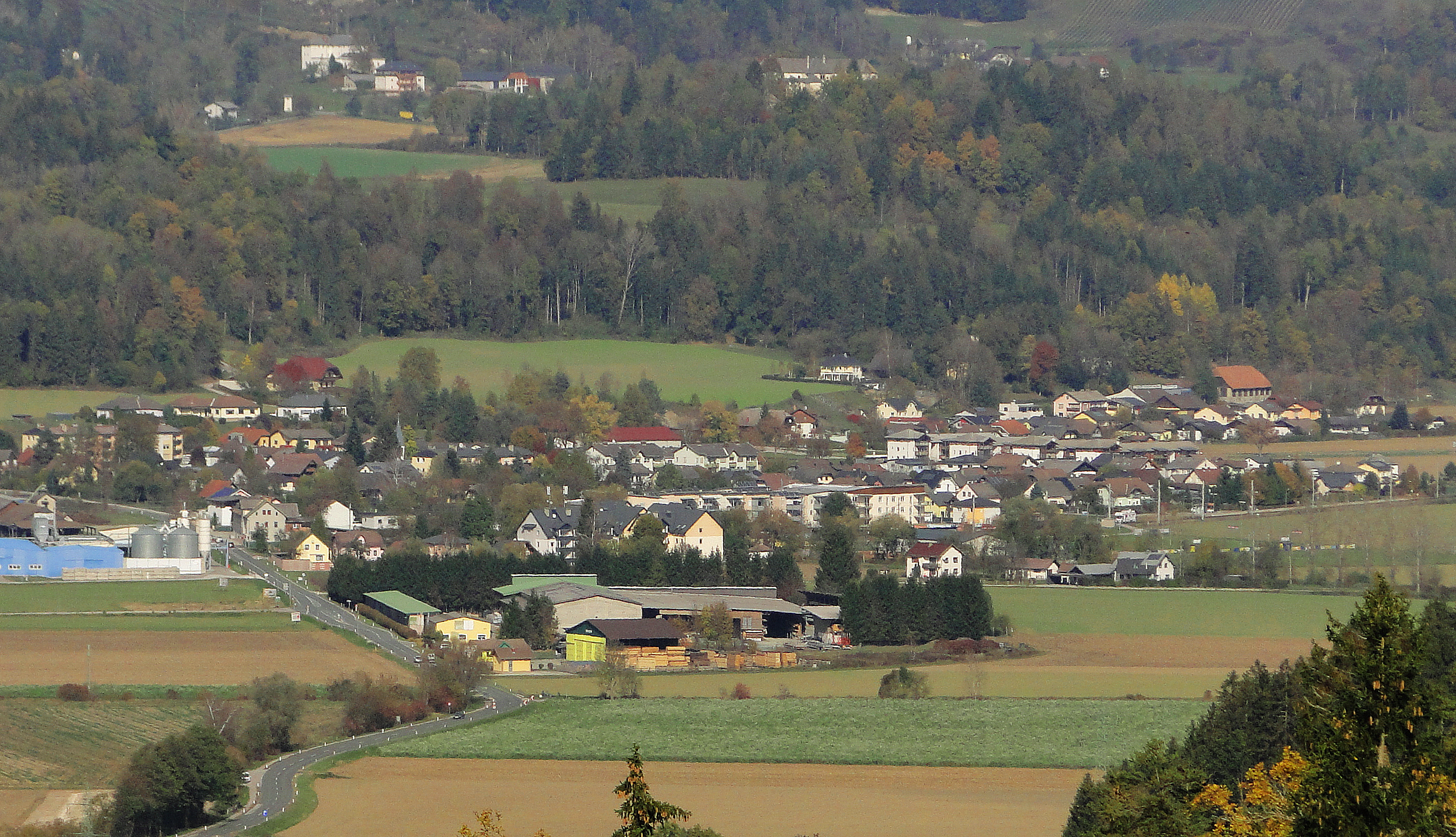 Liebenfels - Ansicht in Richtung Nordosten